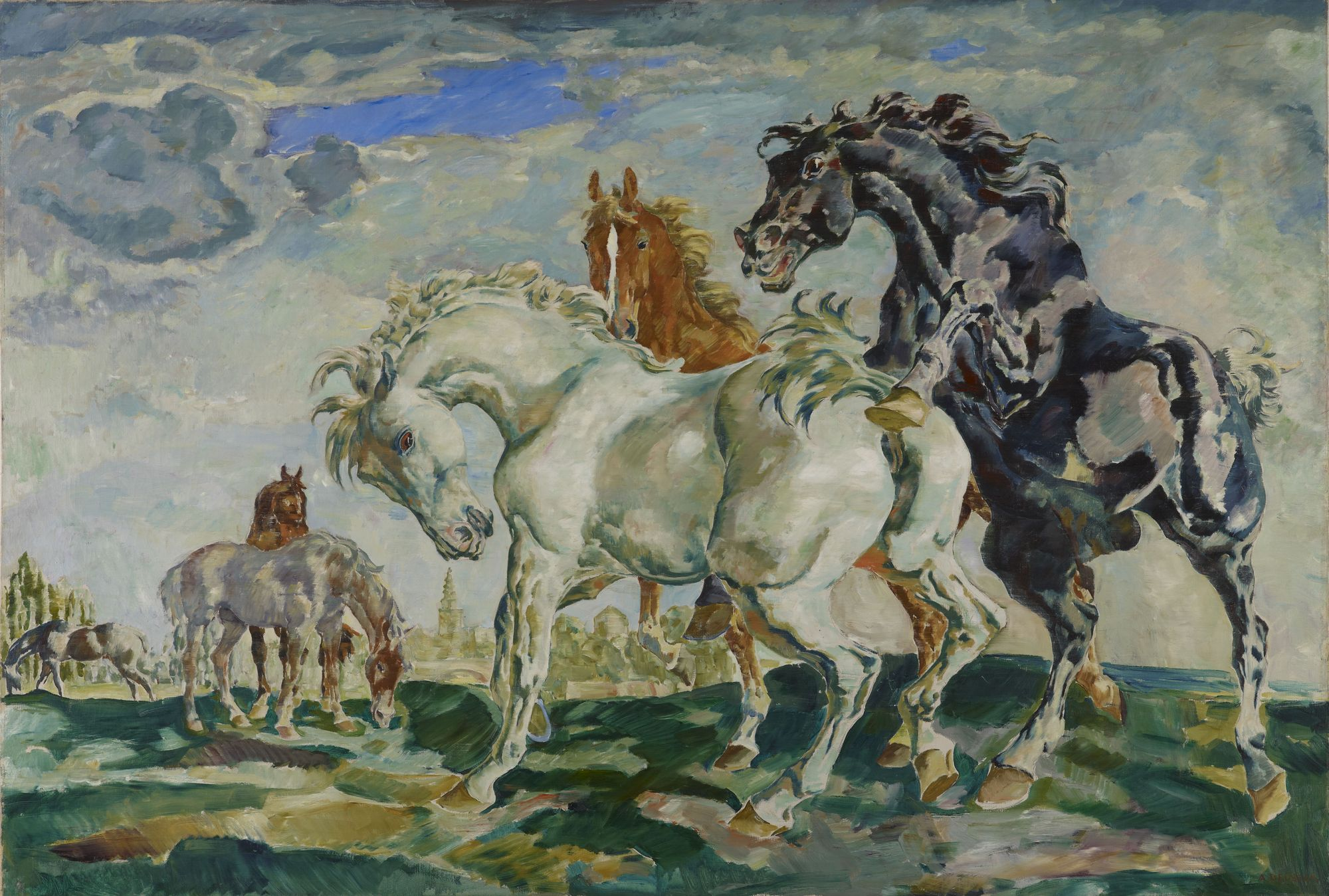 Pferdeakt